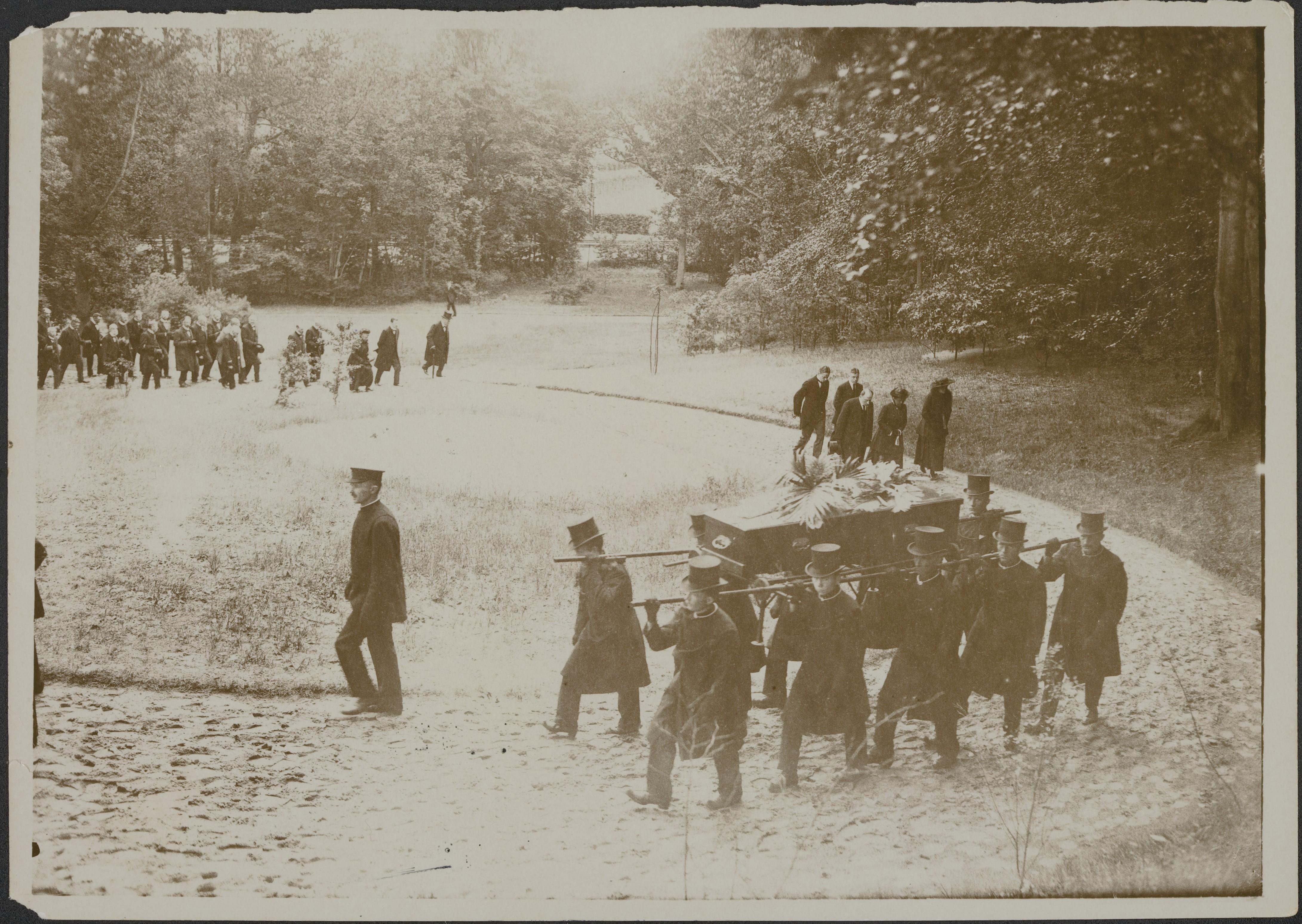 Collectie / Archief : Fotocollectie Eerste Wereldoorlog Reportage / Serie : [ onbekend ] Beschrijving : "Heden werd het stoffelijk overschot van het Kamerlid Lieftinck in het crematorium verbrand." Franciscus Lieftinck (Odoorn, 8 juni 1835 - Haarlem, 7 juli 1917) Datum : 12 juli 1917 Locatie : Driehuis, Nederland Trefwoorden : crematoria, eerste wereldoorlog, politici Persoonsnaam : Lieftinck, F. Fotograaf : N.V. Vereenigde Fotobureaux Auteursrechthebbende : Materiaalsoort : Foto (zwart/wit) Nummer archiefinventaris : bekijk toegang 2.24.09 Bestanddeelnummer : 158-2083